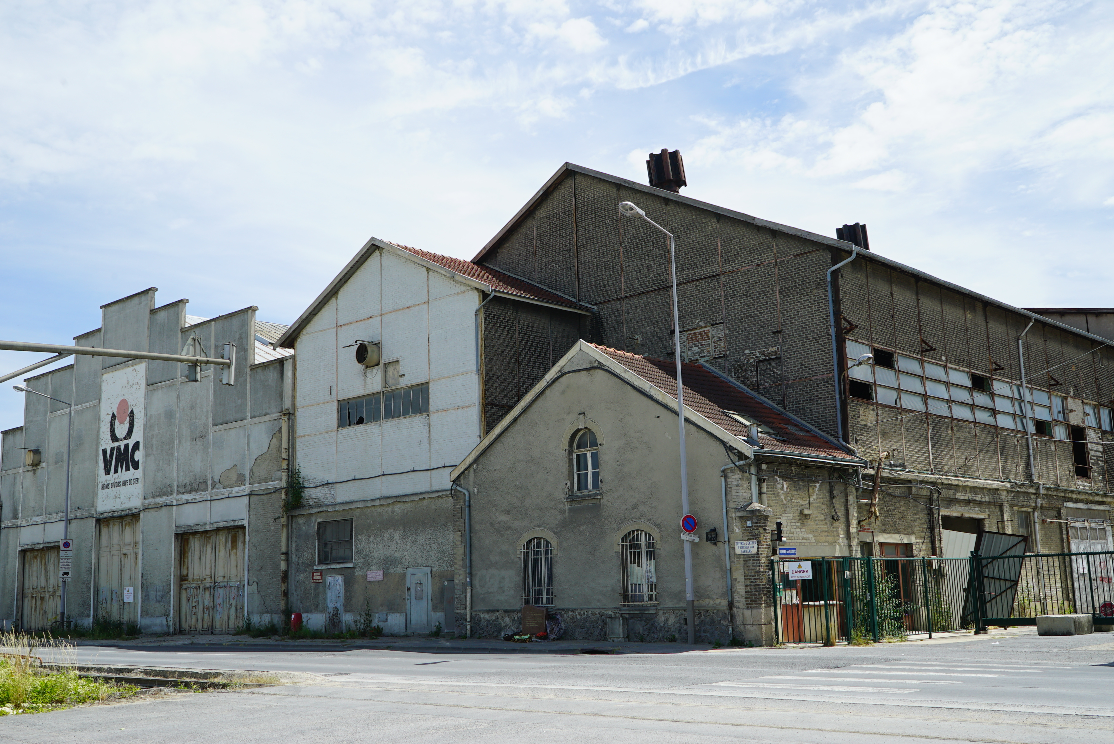 autour de la verrerie VMC de Reims/Saint-Brice.